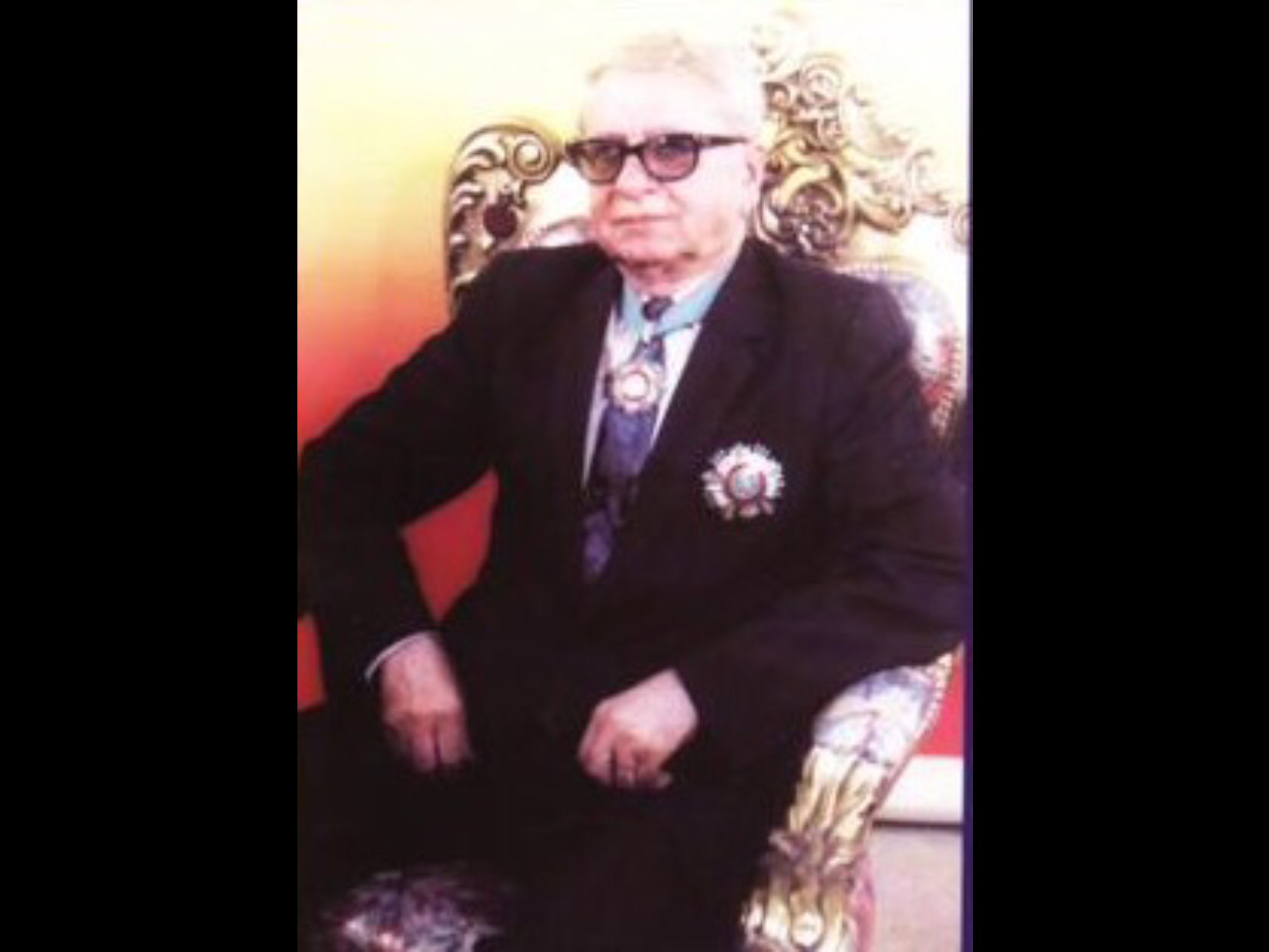 الدكتور اكرم نشأت ابراهيم